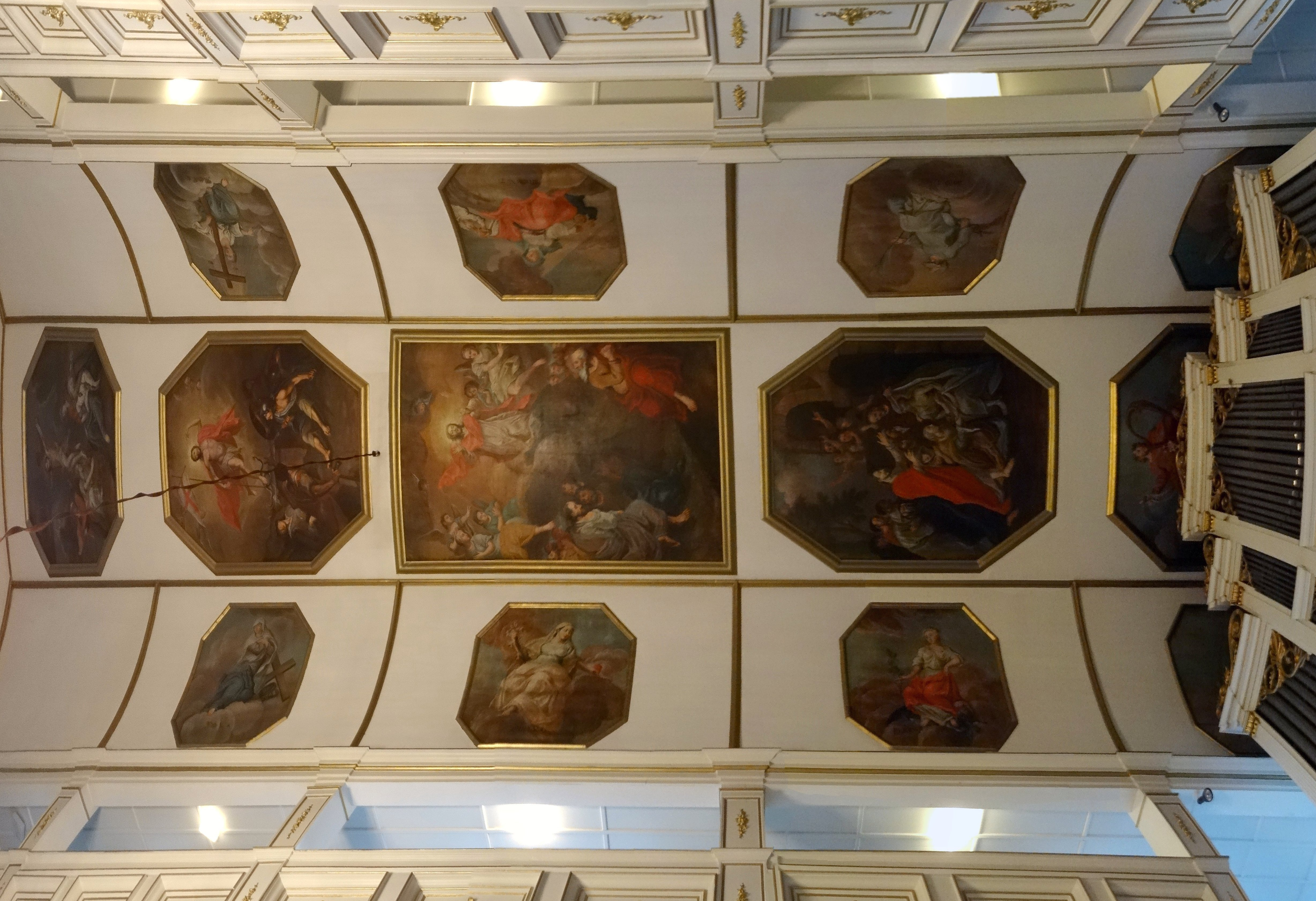 Die Deckenmalereien des Gothaer Hofmalers Johann Heinrich Ritter (1750) zeigen Szenen der Kreuzigung, des Osterfestes, der Himmelfahrt Christi, der Auferweckung des Lazarus und von König David mit Harfe.